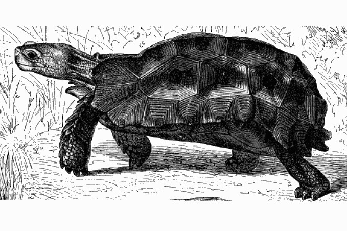 Kinixys erosa